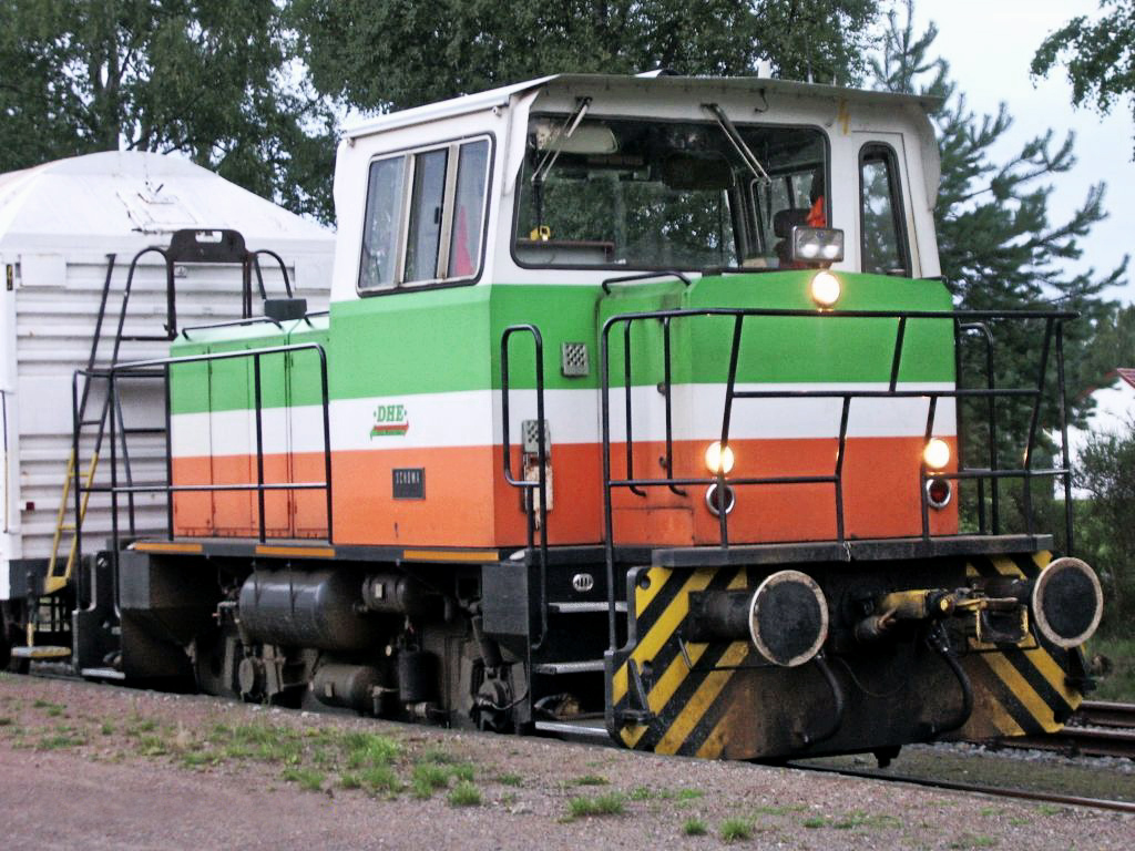 Delmenhorst-Harpstedter Eisenbahn Lok9 rangiert im Bahnhof Delmenhorst Annenheide mit Kühlwaggons